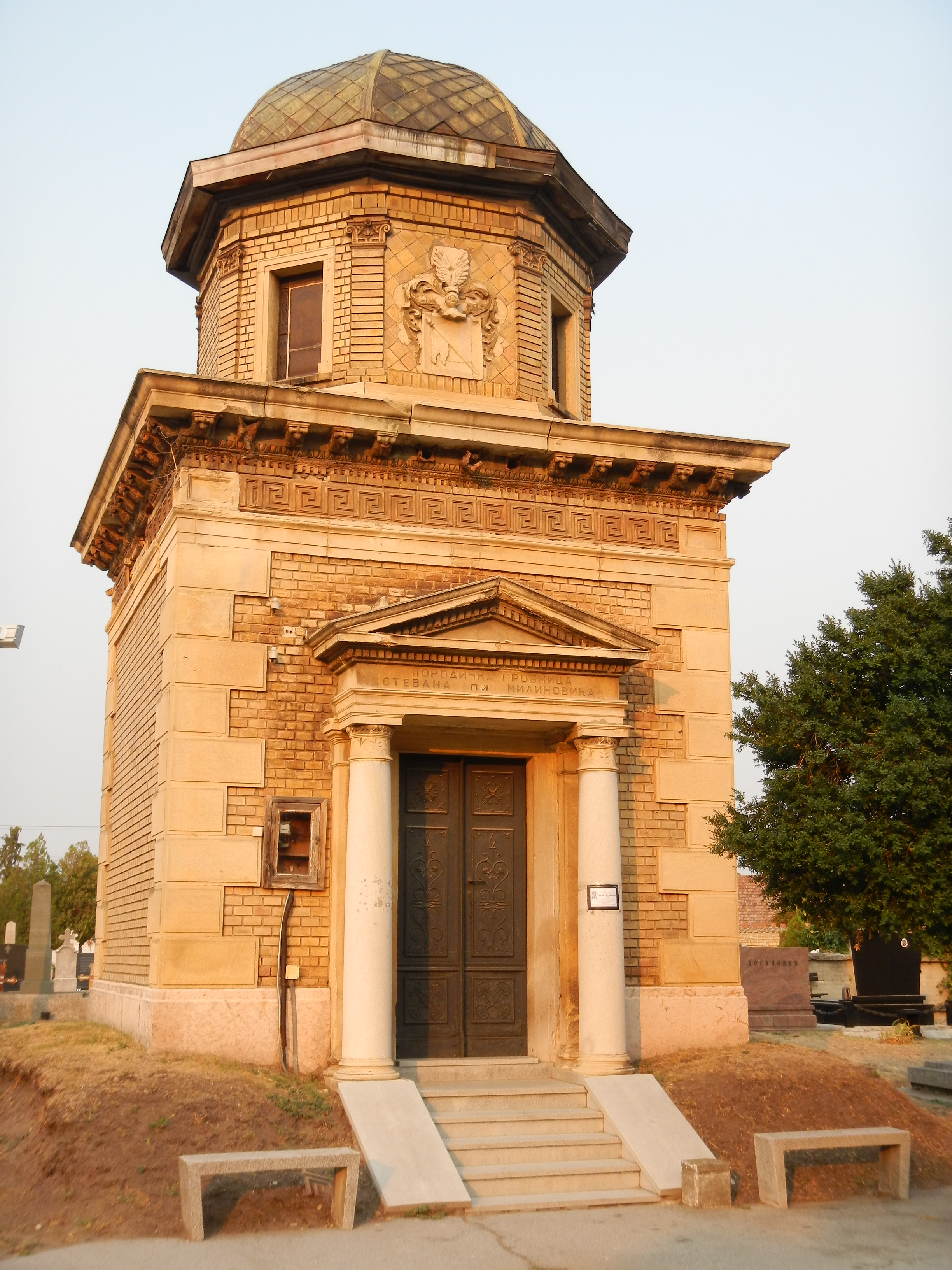 Капела Милиновић подигнута је 1898. године у стилу еклектике. Налази се на десној страни Православног гробља у Суботици. Улаз у капелу има облик грчког храма, а маркирају га два стуба који се завршавају једноставним капителима флоралне декорације. На капителе належе профилисани архитрав изнад којег је натпис - ПОРОДИЧНА ГРОБНИЦА СТЕВАНА МИЛИНОВИЋА